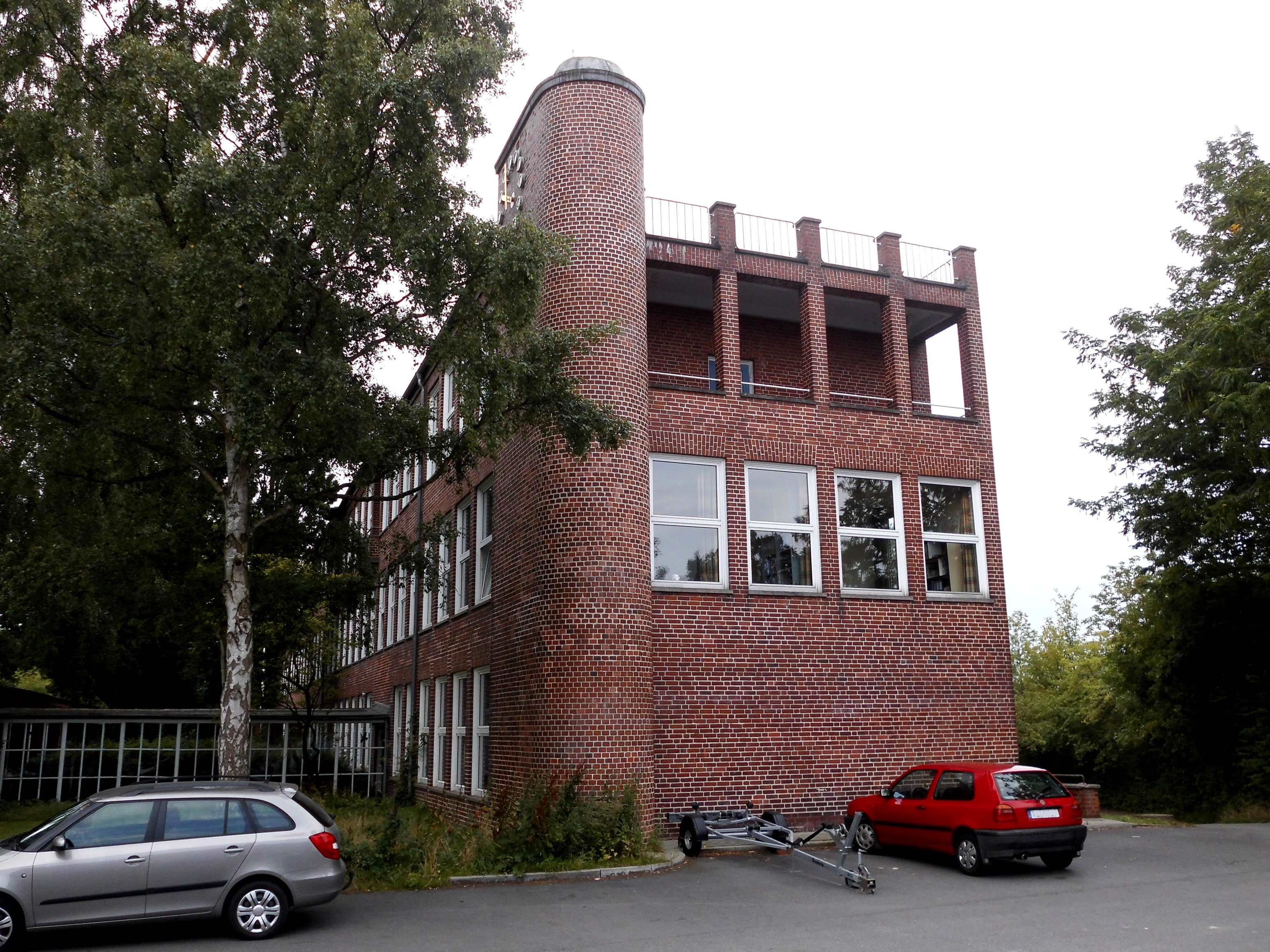 Gebäudekomplex der Friedrich-Junge-Schule im Kieler Stadtteil Schreventeich.